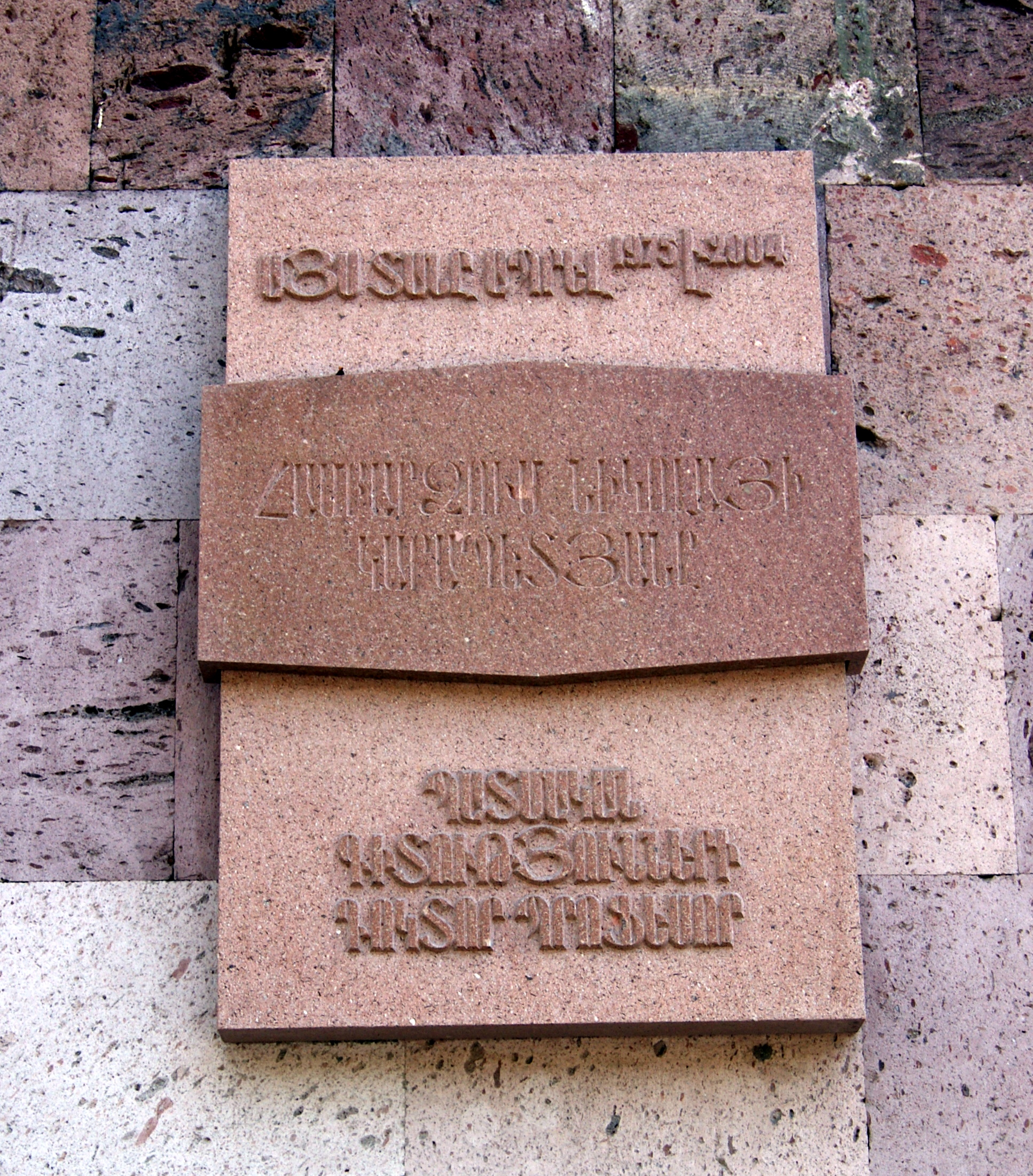 Hambardzum Karapetyan's plaque